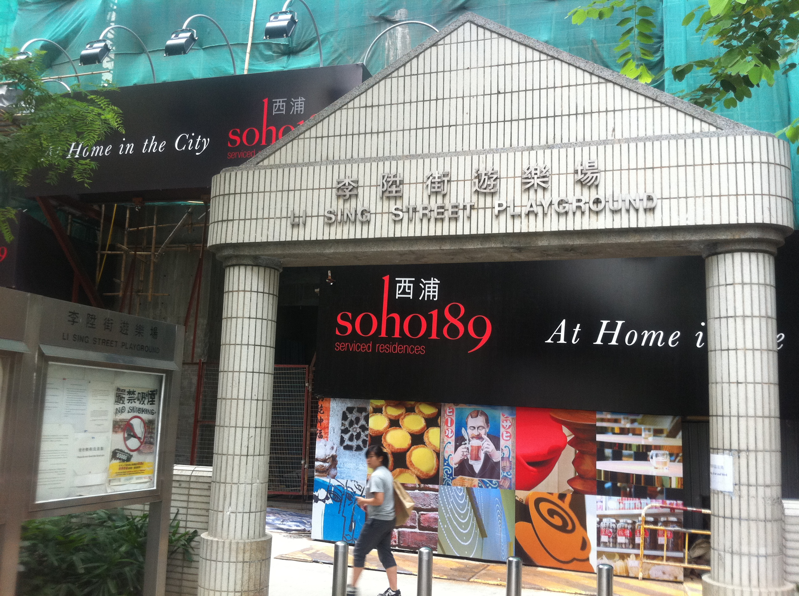 中文（香港）: 上環李陞街